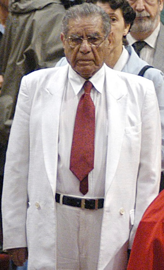 El tío Lalo Parra durante el velatorio de Gladys Marín Millié.